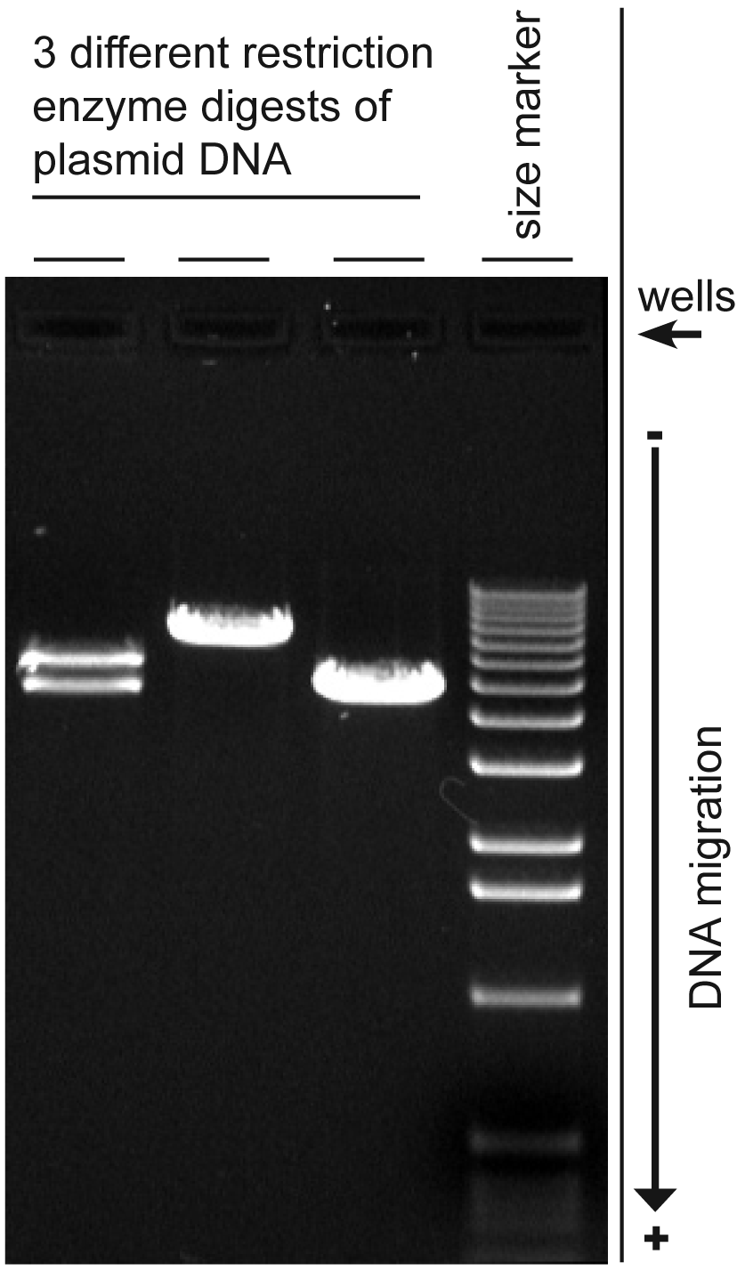 Assembling a Nacatamale